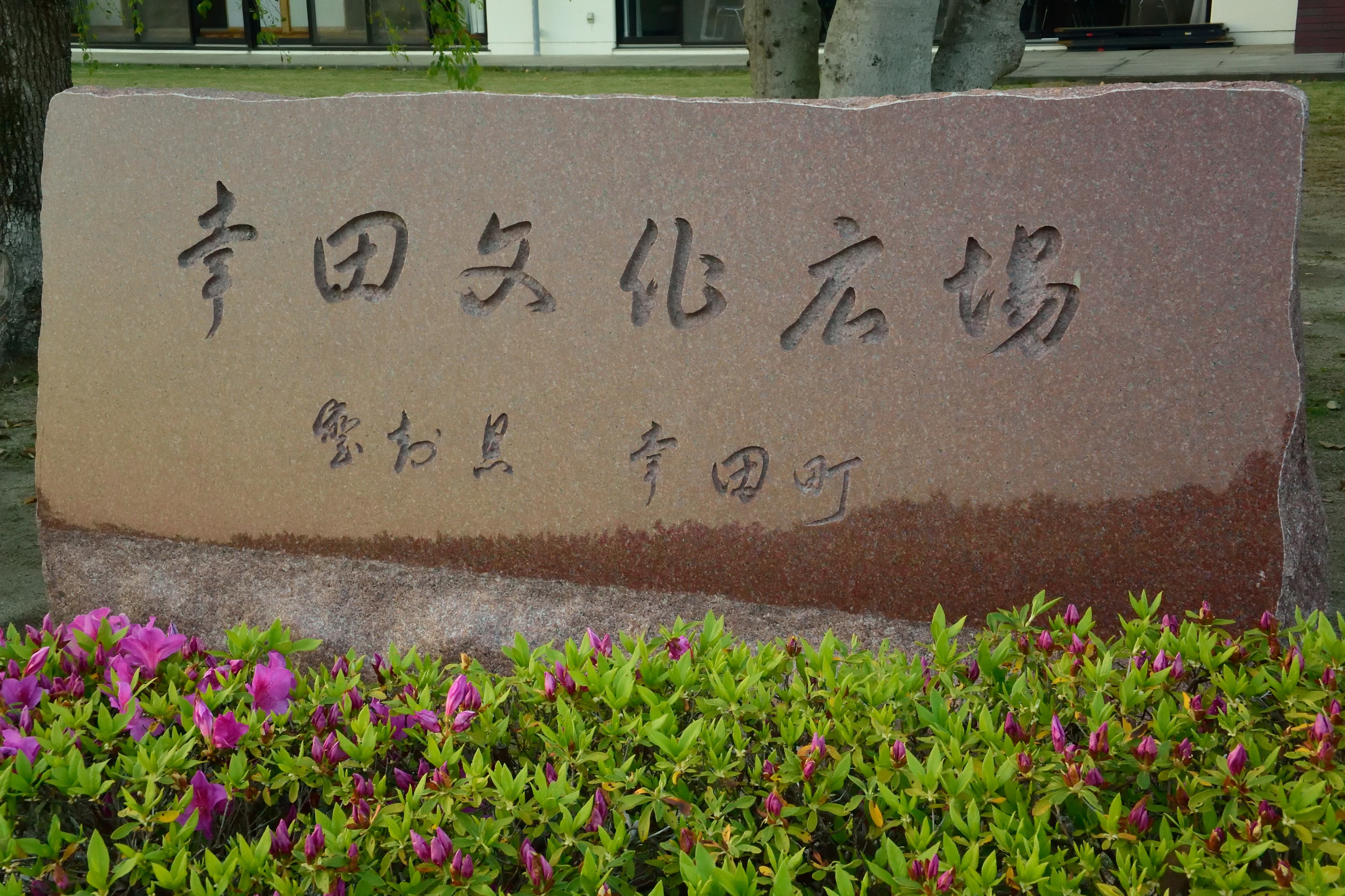 幸田文化広場石碑